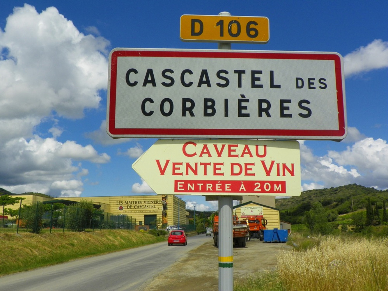 Panneau indicatif de la cave des vignerons de Cascastel-des-Corbières, productrice de Fitou AOC, Corbières AOC et des VDN Rivesaltes et Muscat de Rivesaltes